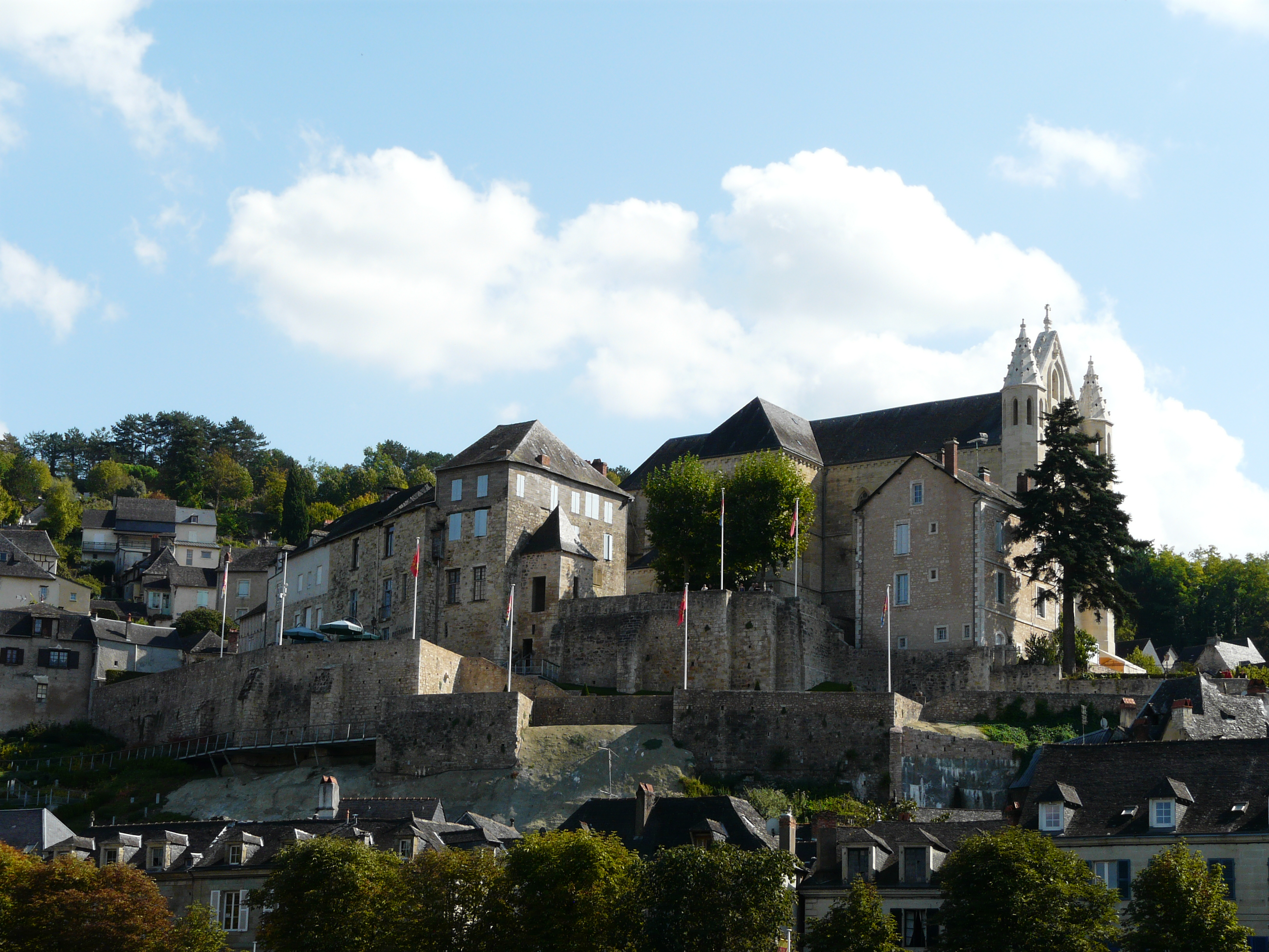 Les remparts de la vielle ville de Terrasson, Terrasson-Lavilledieu, Dordogne, France.